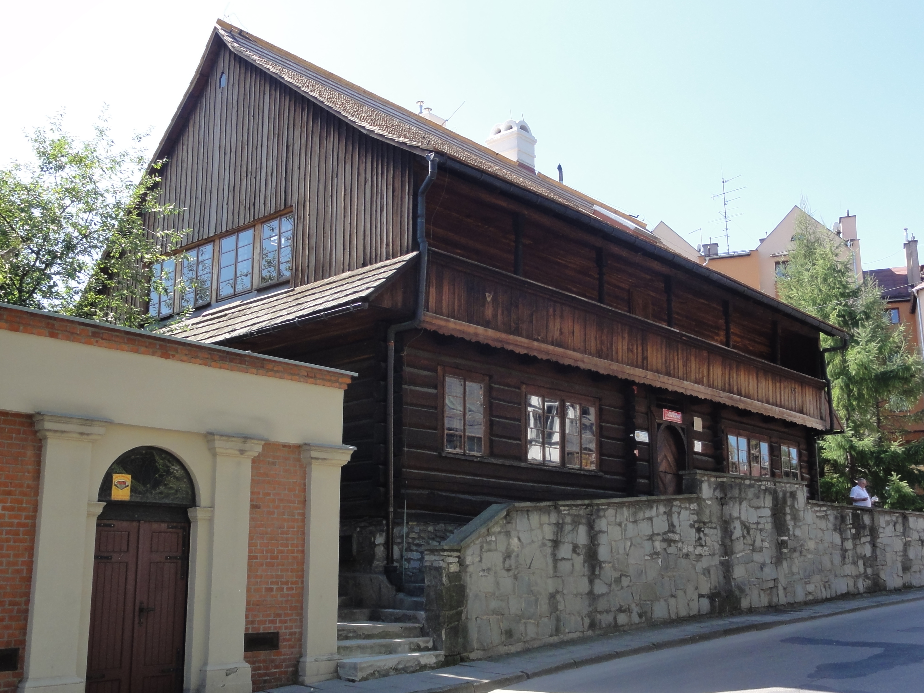 Bielsko-Biała, ul. Sobieskiego 51, tzw. Dom Tkacza, muzeum